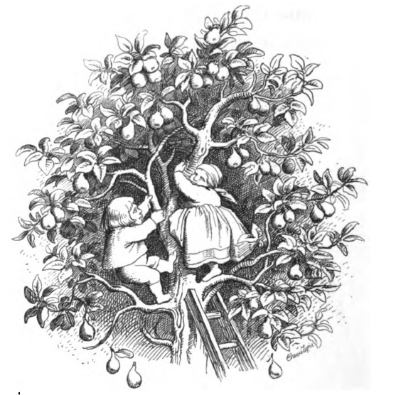 Spannenlanger Hansel, Illustration aus: Georg Scherer, Alte und neue Kinderlieder, Fabeln, Sprüche und Räthsel. Mayer, Leipzig 1849, S. 110.